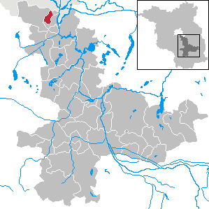 Schulzendorf in Brandenburg (Country) - District Dahme-Spreewald